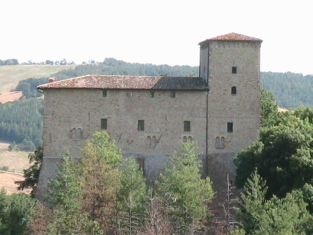 Careno (Pellegrino Parmense) - Il Castello